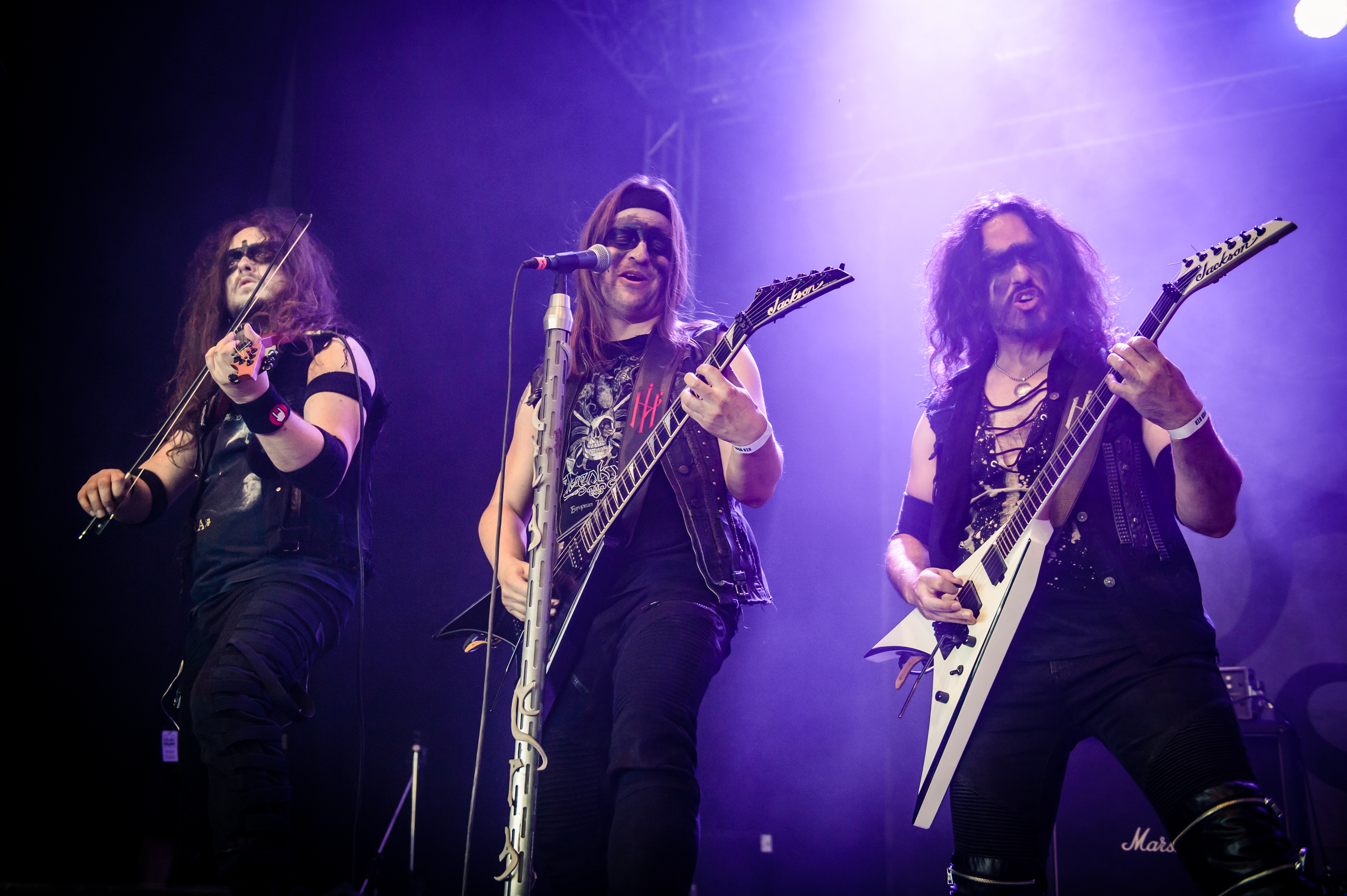 'Dong Open Air 2017; Neukirchen-Vluyn': 'Elvenking'